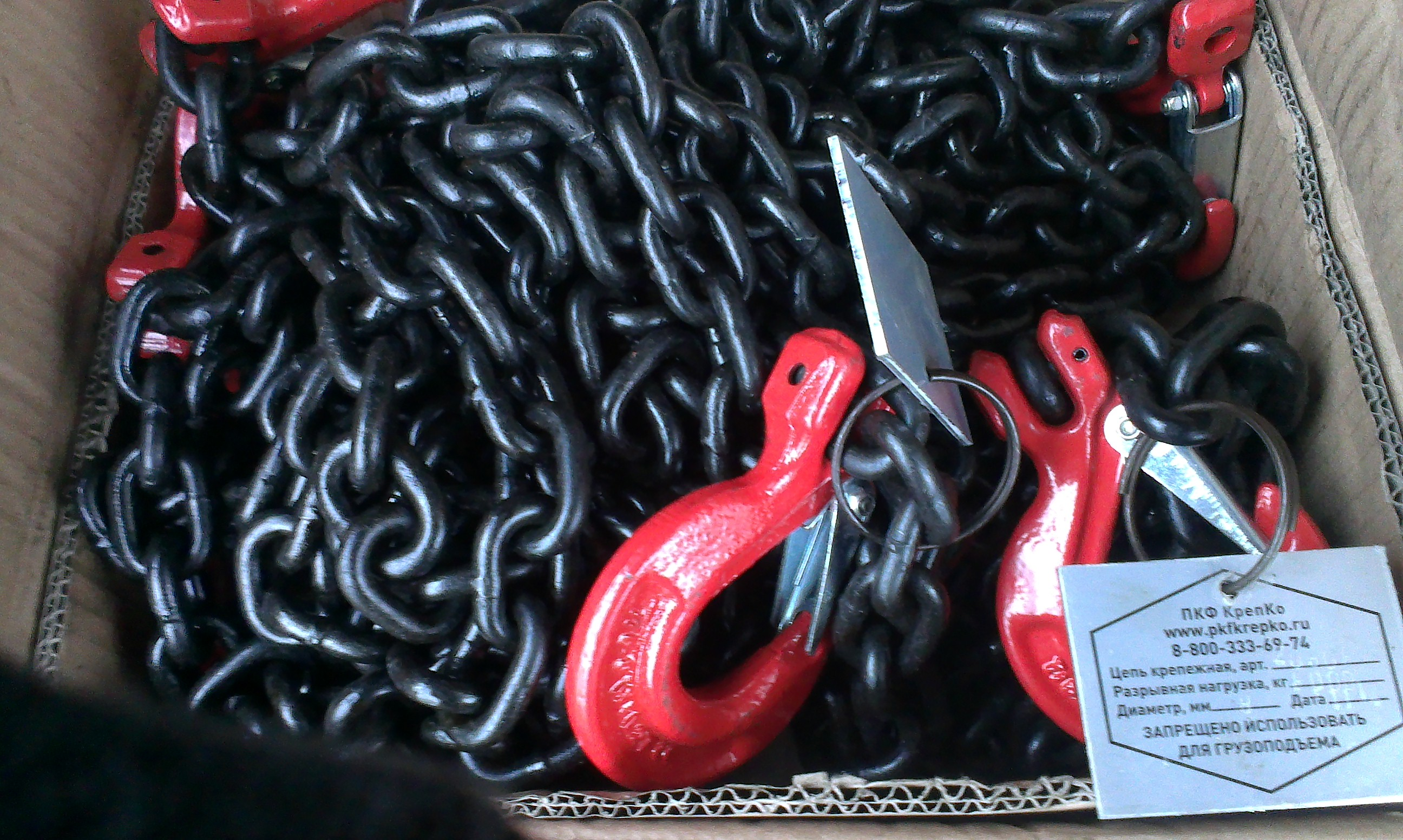 Крепежная цепь арт. AZ0808, разрывная нагрузка 8 тонн, допустимая нагрзука 5,6т, рабочая - 4 тонны. На фото представлена со стандартной биркой крепежных изделий.